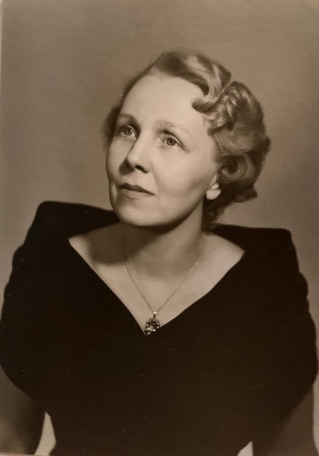 Aino Rounioja-Outakoski, suomalainen laulaja ja laulunopetteja